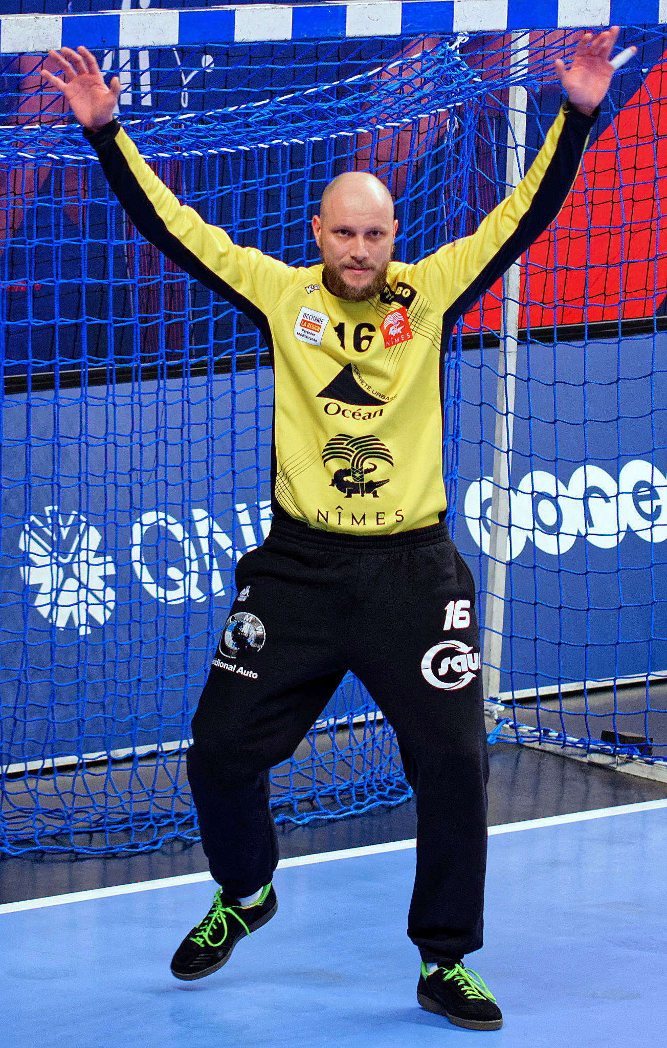 Rencontre de championnat de LidlStarLigue entre le PSG et Nîmes. A Coubertin, le 8 février 2017.